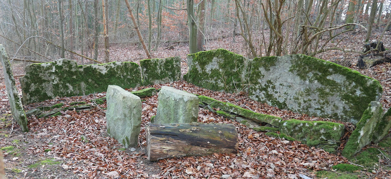 Dieser Steintisch ist einer von drei im sog. Südholz, dem zum Gute Nienfeld gehörenden Teil des Süntels. Er ist mit Legenden behaftet, darunter ein geplantes Duell zwischen Alexander von Münchhausen und Bismarck sowie außerdem eine Geistergeschichte (vgl. Mierau/Wildhagen, Über den Deister gehen, Band 1, 1996). Da schon er schon 1907 in Beschreibung, Geschichte und Sagenkunde des Kreises Springe (Fr. Meissel) erwähnt wird, ist in den 1920ern wohl nur die Tischplatte erneuert worden - sie befindet sich heute auf dem Gutshof (